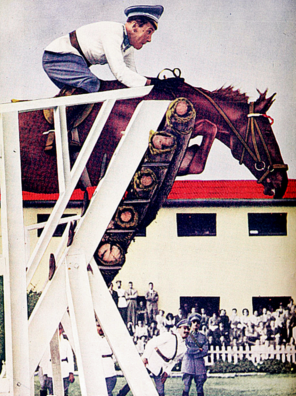 Alberto Larraguibel, en ese entonces capitán del Ejército de Chile, bate el récord mundial de salto alto montando a Huaso. El binomio chileno realizó la célebre marca de 2,47 el 5 de febrero de 1949 y hasta ahora nadie ha podido superarlos.